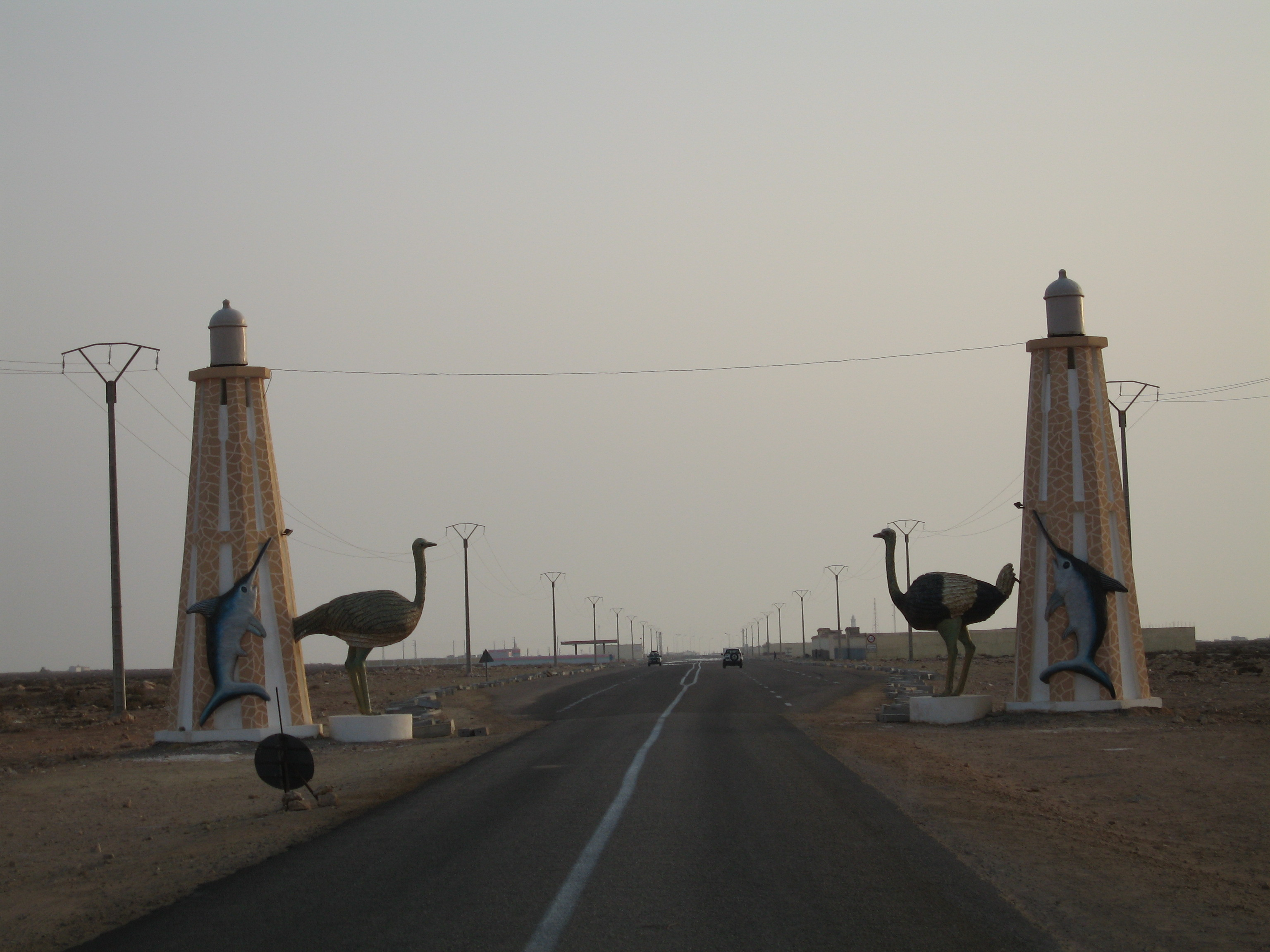 Ruta N1 a la salida de Bojador (Sahara Occidental)